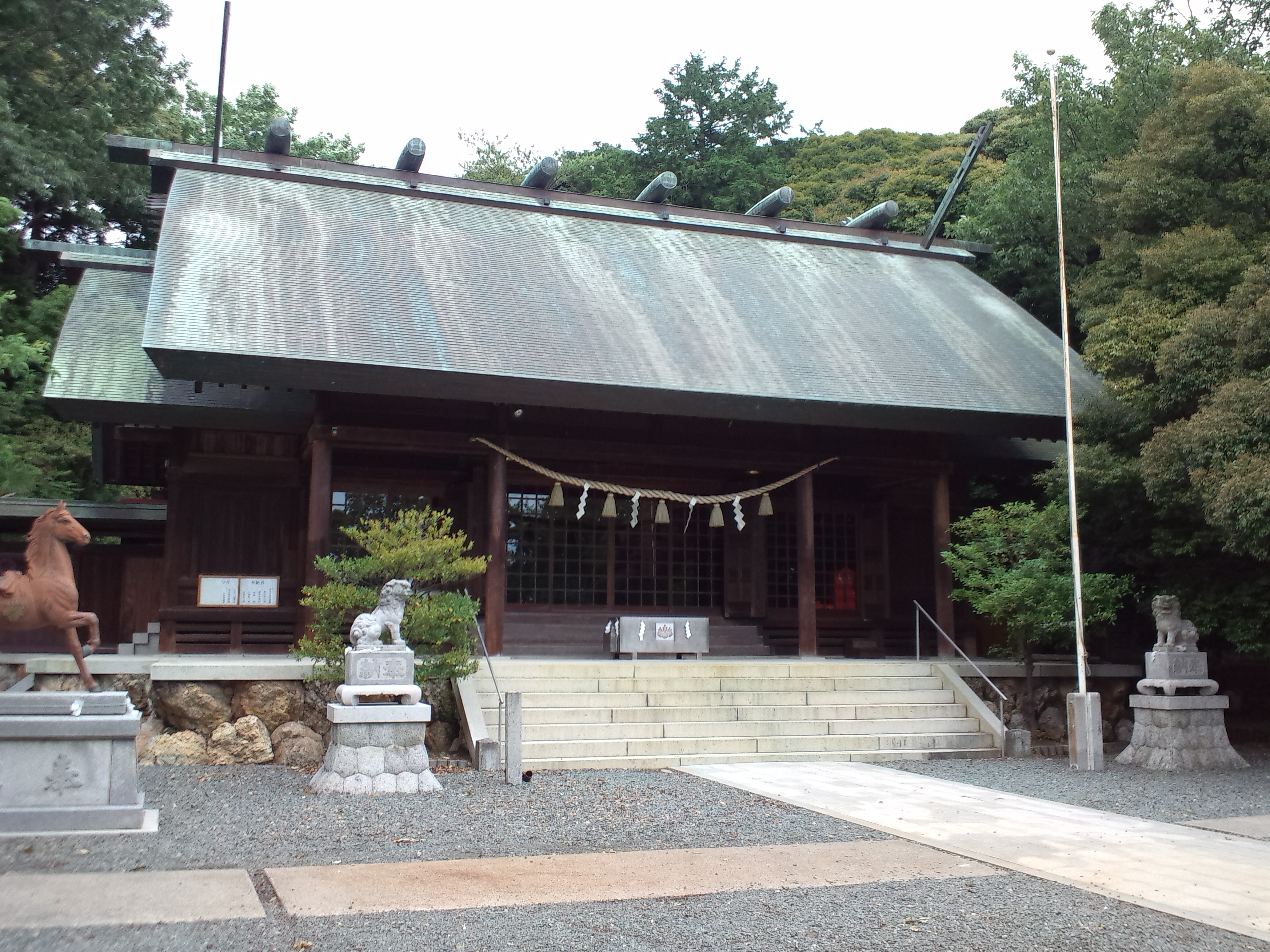 大岩神明宮 拝殿